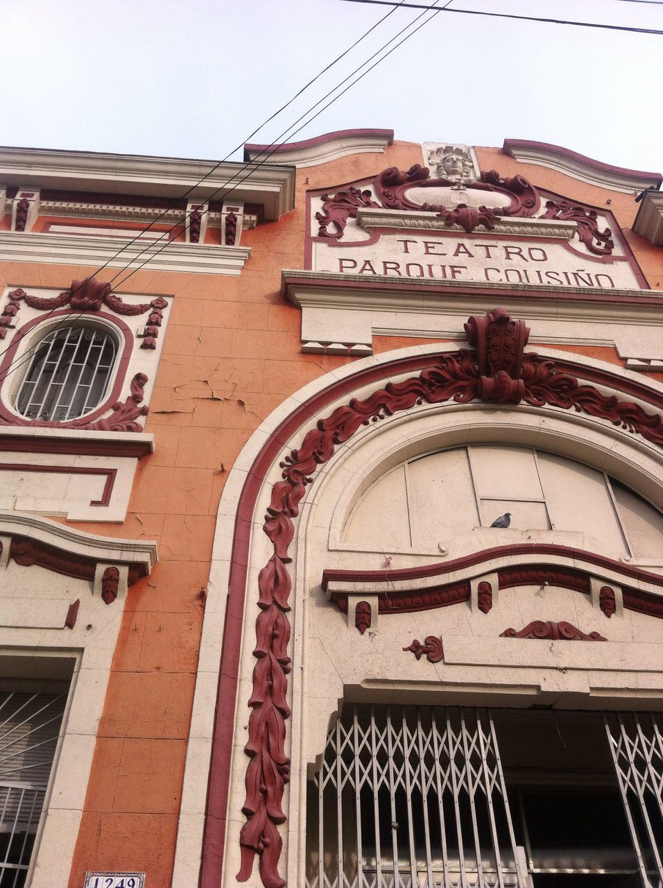 Puerta principal del teatro ubicada en la calle San Ignacio de Loyola.